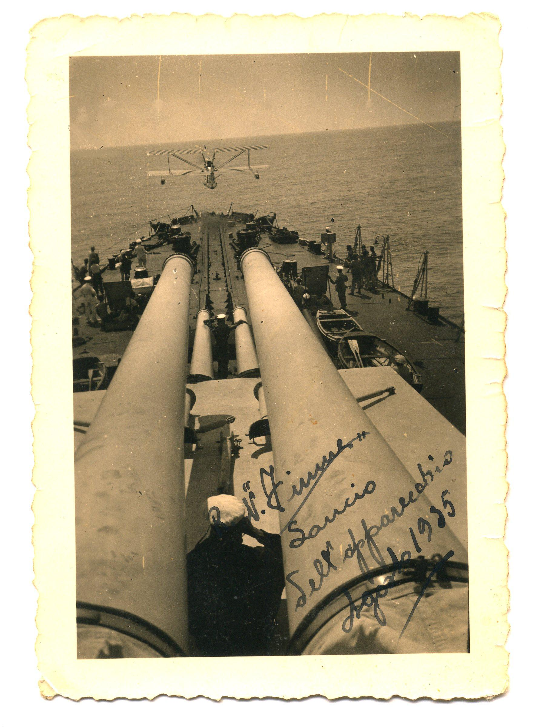 Regia Nave Fiume: lancio idrovolante da bordo.